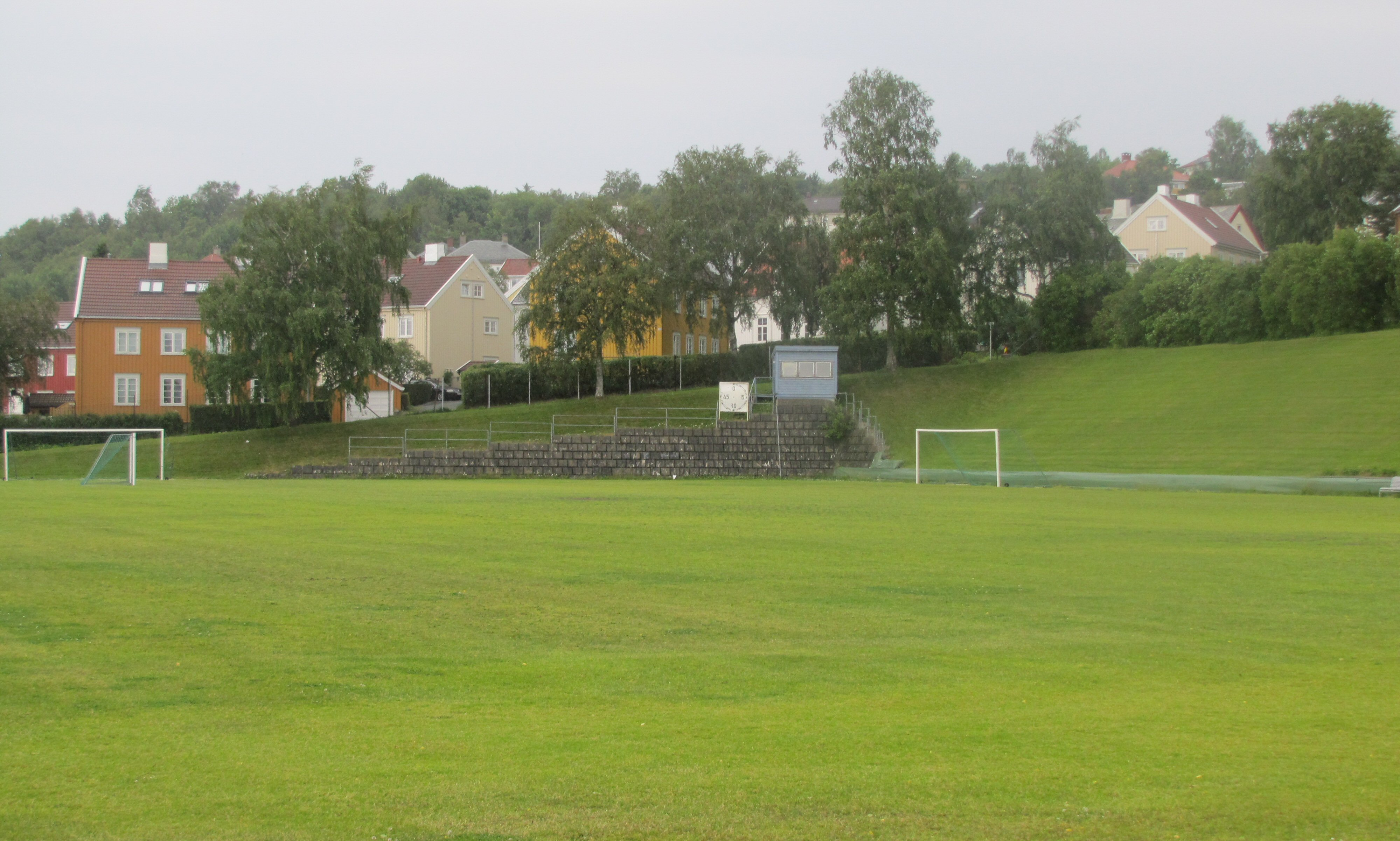 Rosenborgbanen, Trondheim